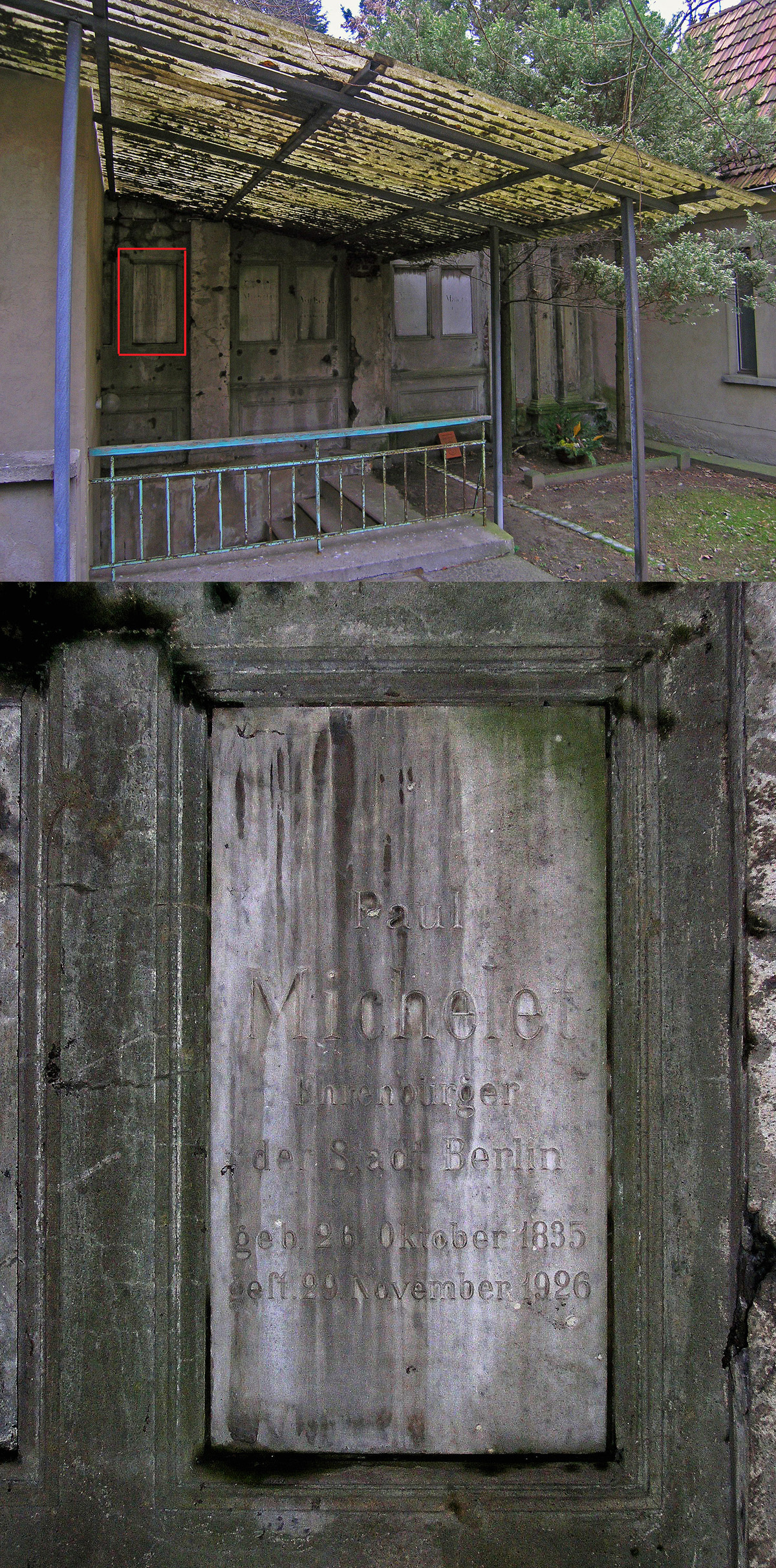 Ehrengrab Paul Michelet und Familie auf dem Friedhof II der Französisch-Reformierten Gemeinde an der Liesenstraße 7 in der "Oranienburger Vorstadt" (heute: Berlin-Wedding). Hier ruht der Stadtverordnetenvorsteher und Ehrenbürger der Stadt Paul Michelet (1835-1926, ganz links) gemeinsam mit seinen Eltern (rechts) und seinem älteren Bruder und dessen Frau (Mitte). Rechts im Vordergrund des ansonsten verfallenen Grabmals winterlicher Blumenschmuck und der Backstein "EHRENGRAB LAND BERLIN".